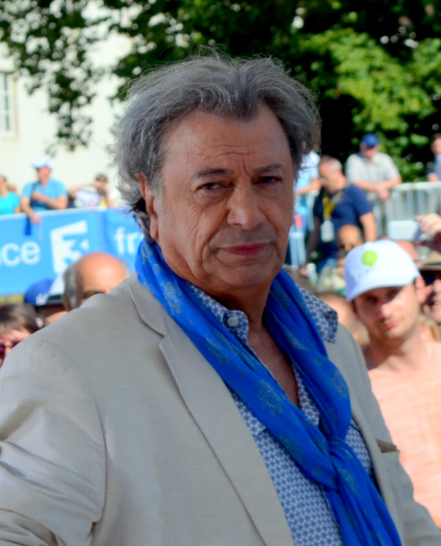 Tour de France 2016, étape 15 dans l'Ain.